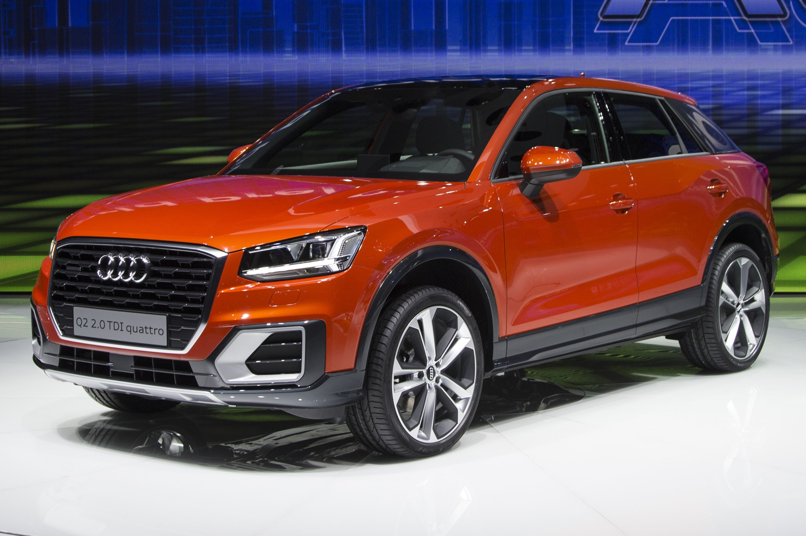 Der neue Audi Q2.